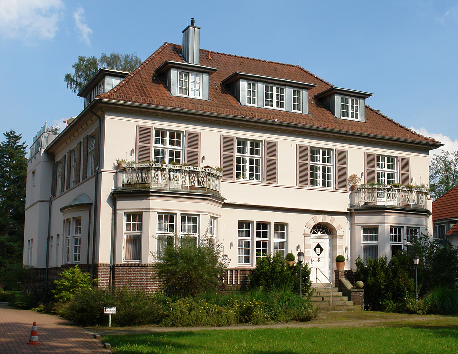 Haus Weltmann in Bremen, Rockwinkeler Heerstraße 119.Das abgebildete Objekt ist ein geschütztes Kulturdenkmal in der Freien Hansestadt Bremen, mit der Nr. 0946 beim Landesamt für Denkmalpflege registriert.